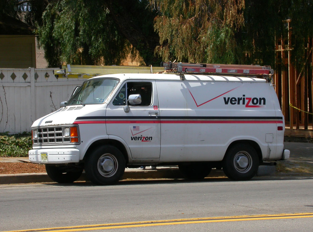 1980s Dodge Ram Van Verizon